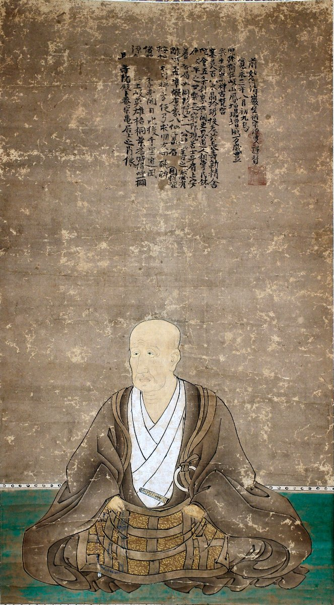 妻木城主・妻木貞徳の肖像画。